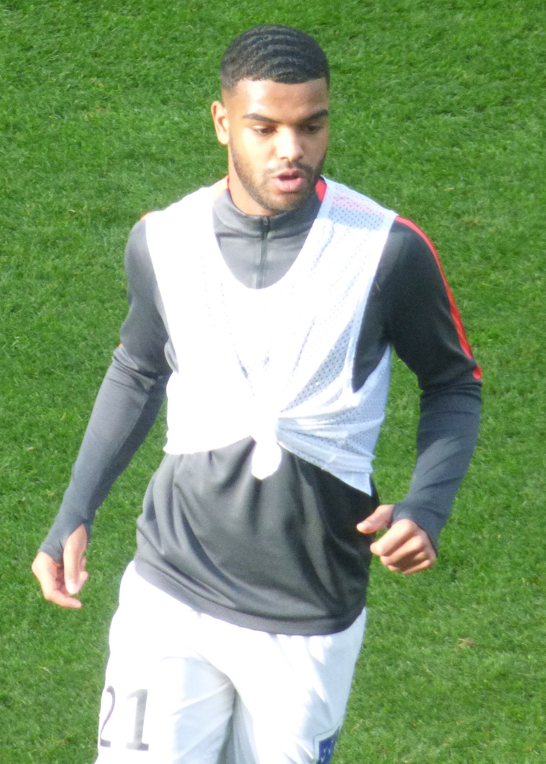 Christopher Opéri avant le match RC Lens / LB Châteauroux, le 3 novembre 2018, comportant pour la treizième journée du championnat de France de football de Ligue 2, au Stade Bollaert-Delelis.